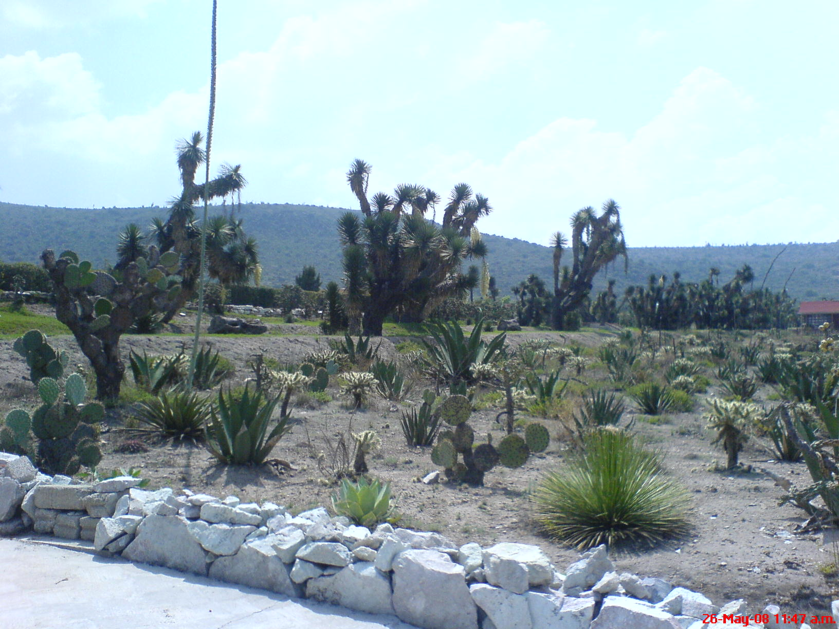 plantas de parque ecologico cubitos